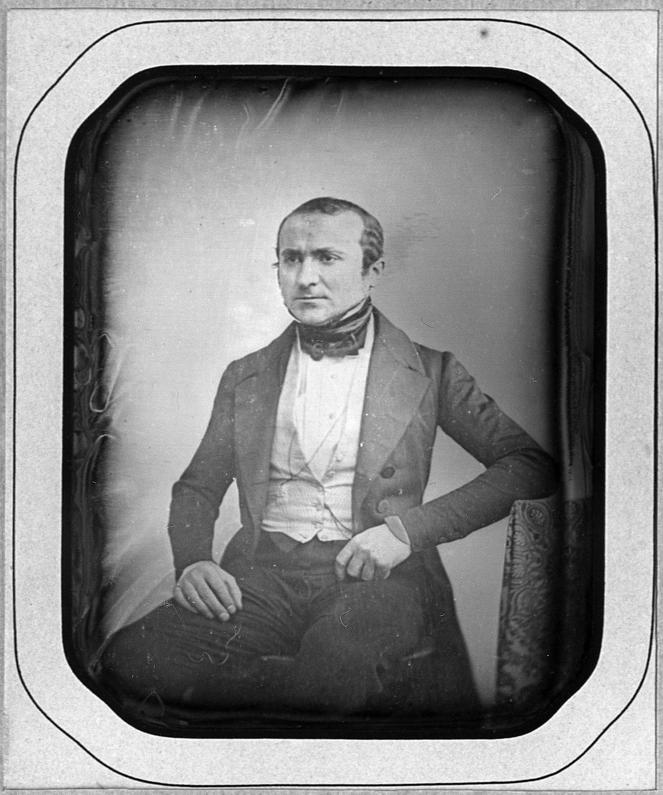 Numérisation d'un Daguerréotype d'Auguste-Émile Egger en 1844 - Atelier inconnu - Daguerréotype appartenant encore à la famille (A.Egger)